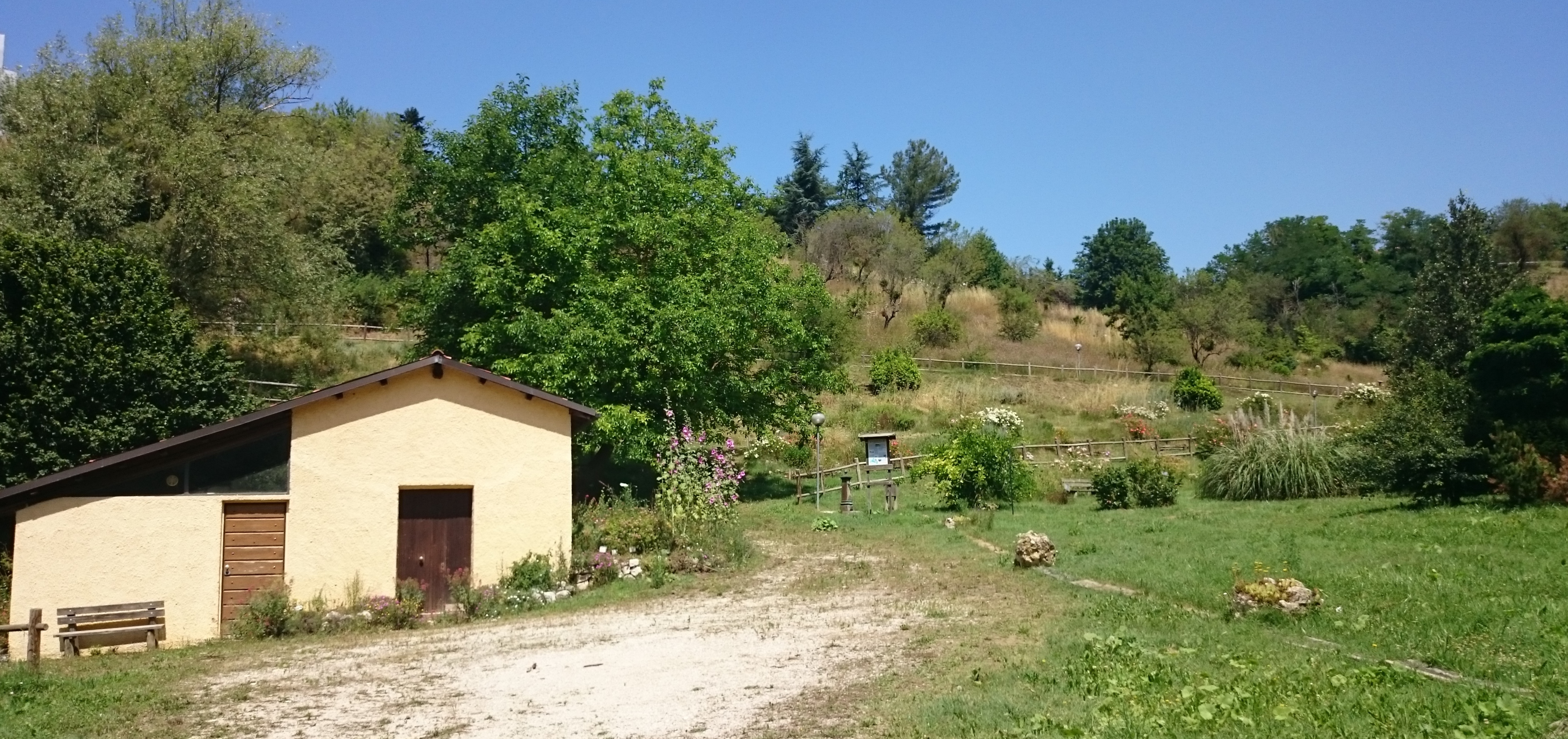 Orto Botanico di Collemaggio